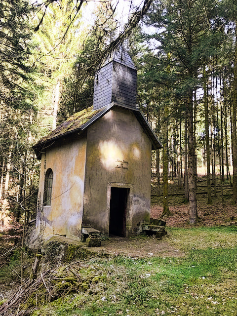 Chapelle au milieu des bois à proximité du col de Mon Repos (commune de La Bourgonce / département des Vosges / région Grand Est / France)